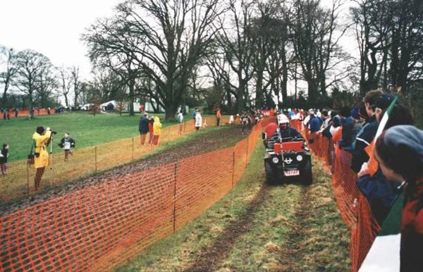 Detalle de circuito de campo a través